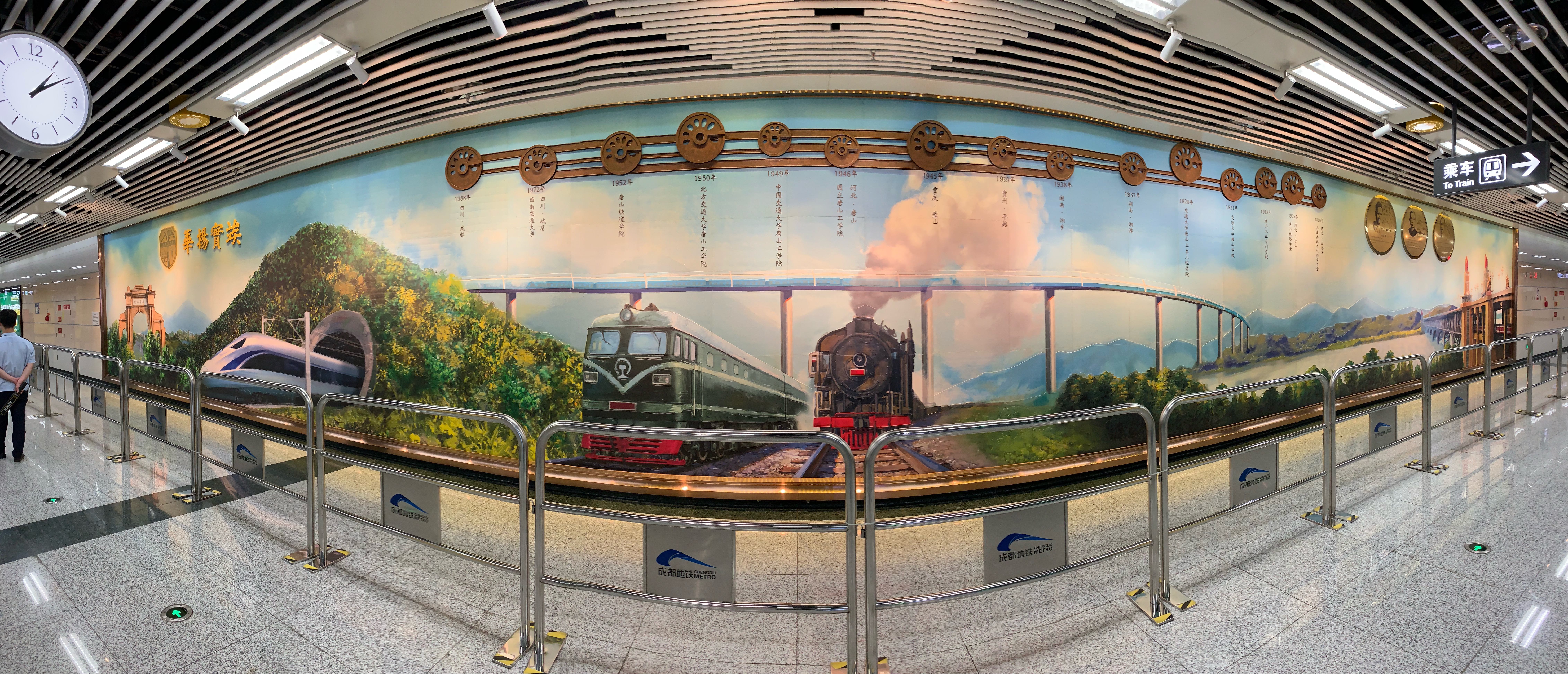 成都地铁西南交大站